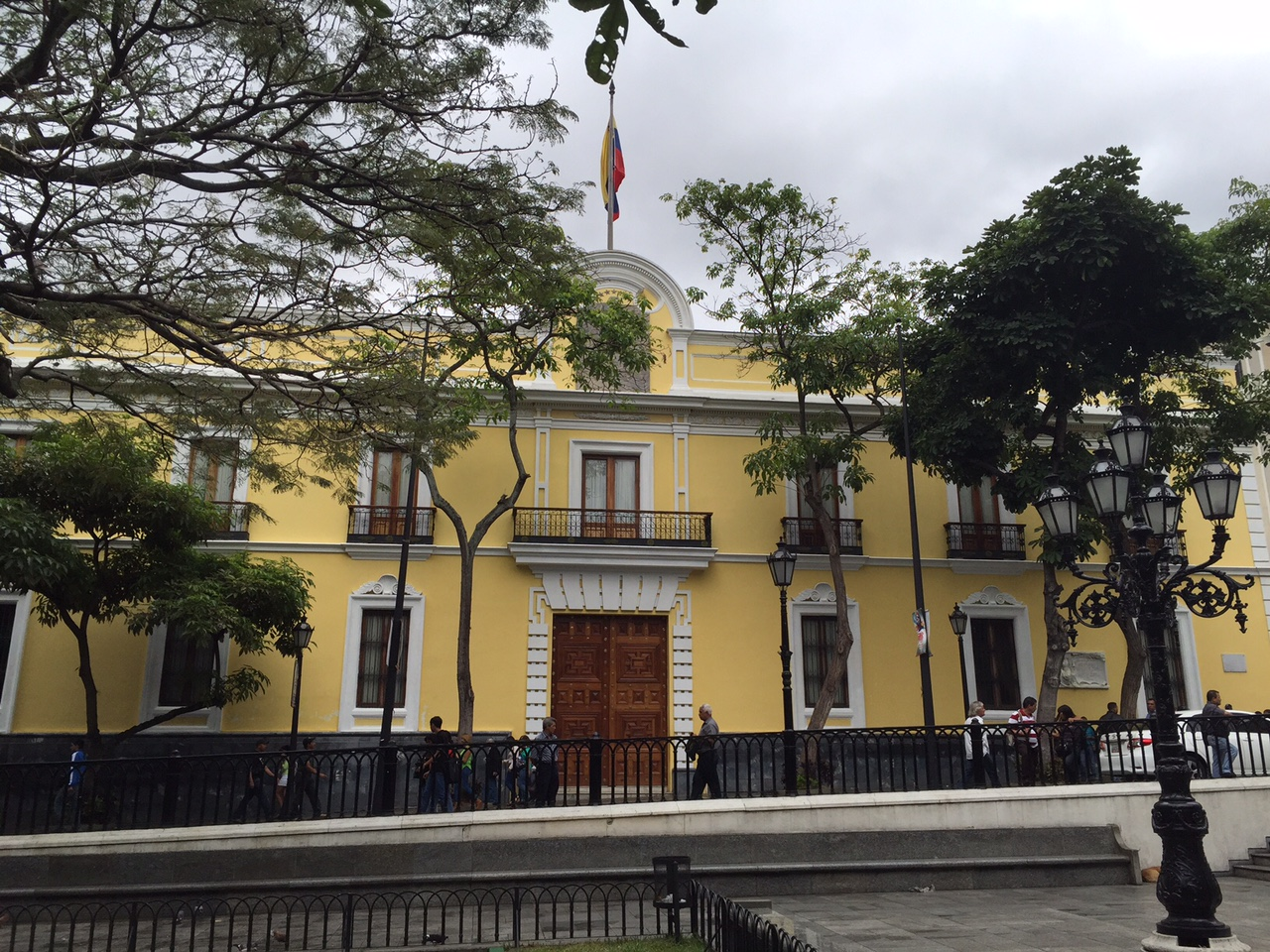 Casa Amarilla de Caracas, sede protocolar del Ministerio de Relaciones Exteriores de Venezuela.